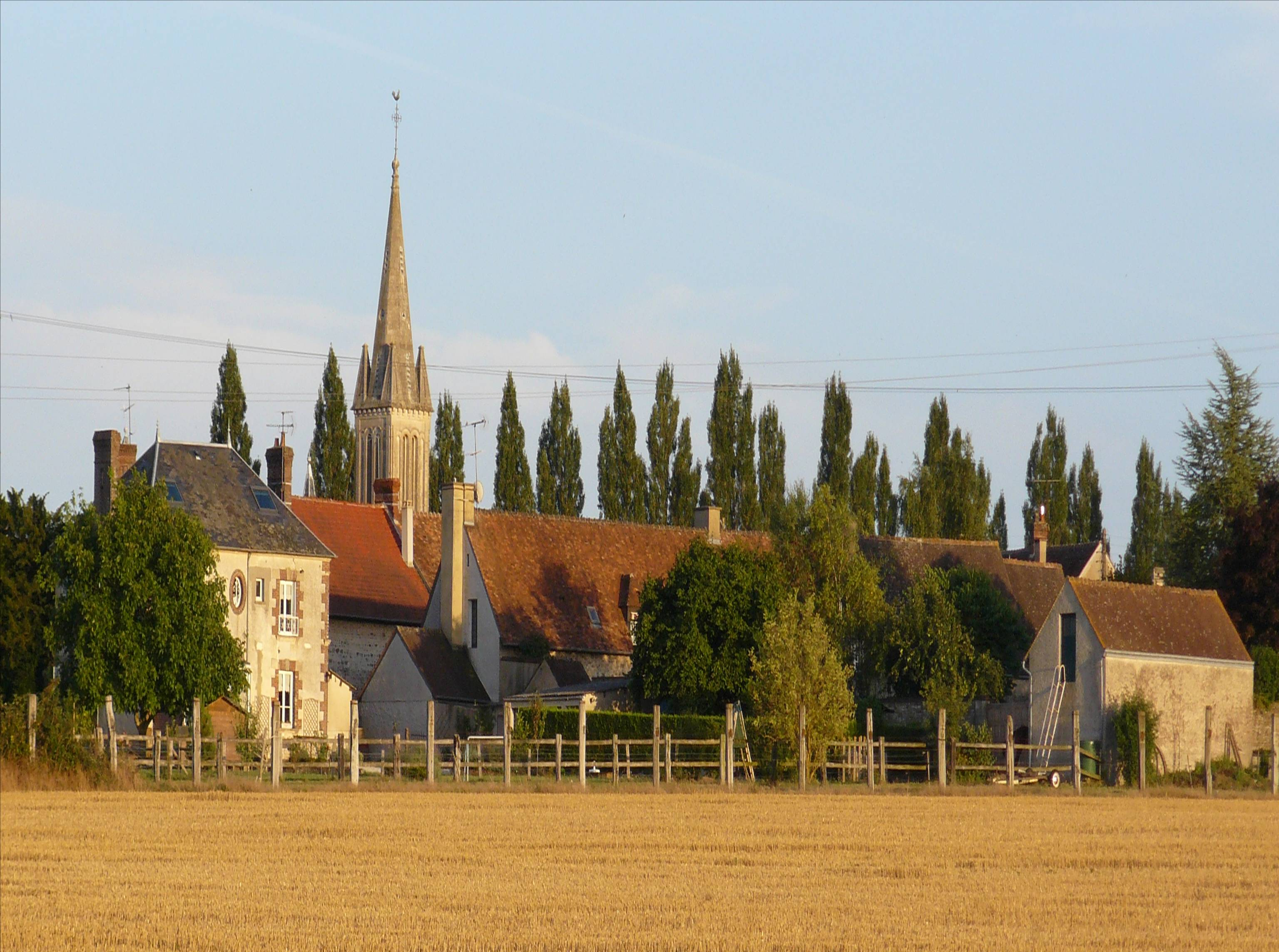 Vue du bourg depuis la plaine